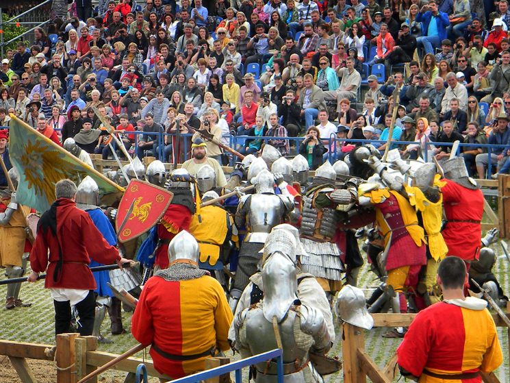 Фестываль Спадчына вякоў у Мірскім замку